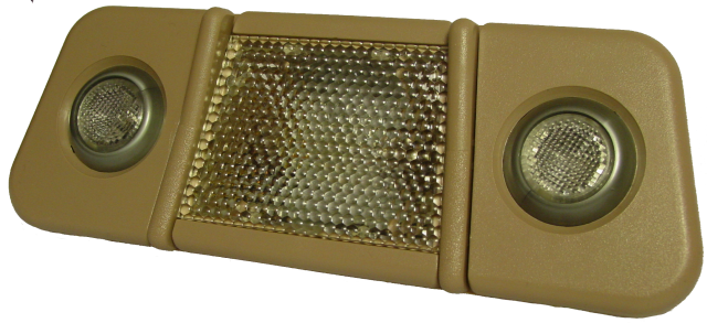 Innenraumleuchte vom Opel Omega